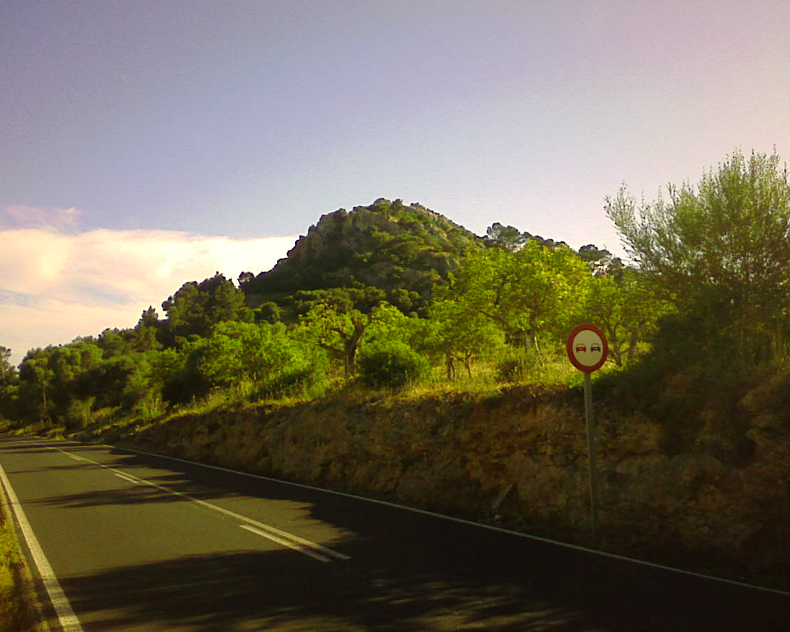 El puig de l'Escolà (Algaida-Llucamjor, Mallorca) des de la carretera MA-5010.